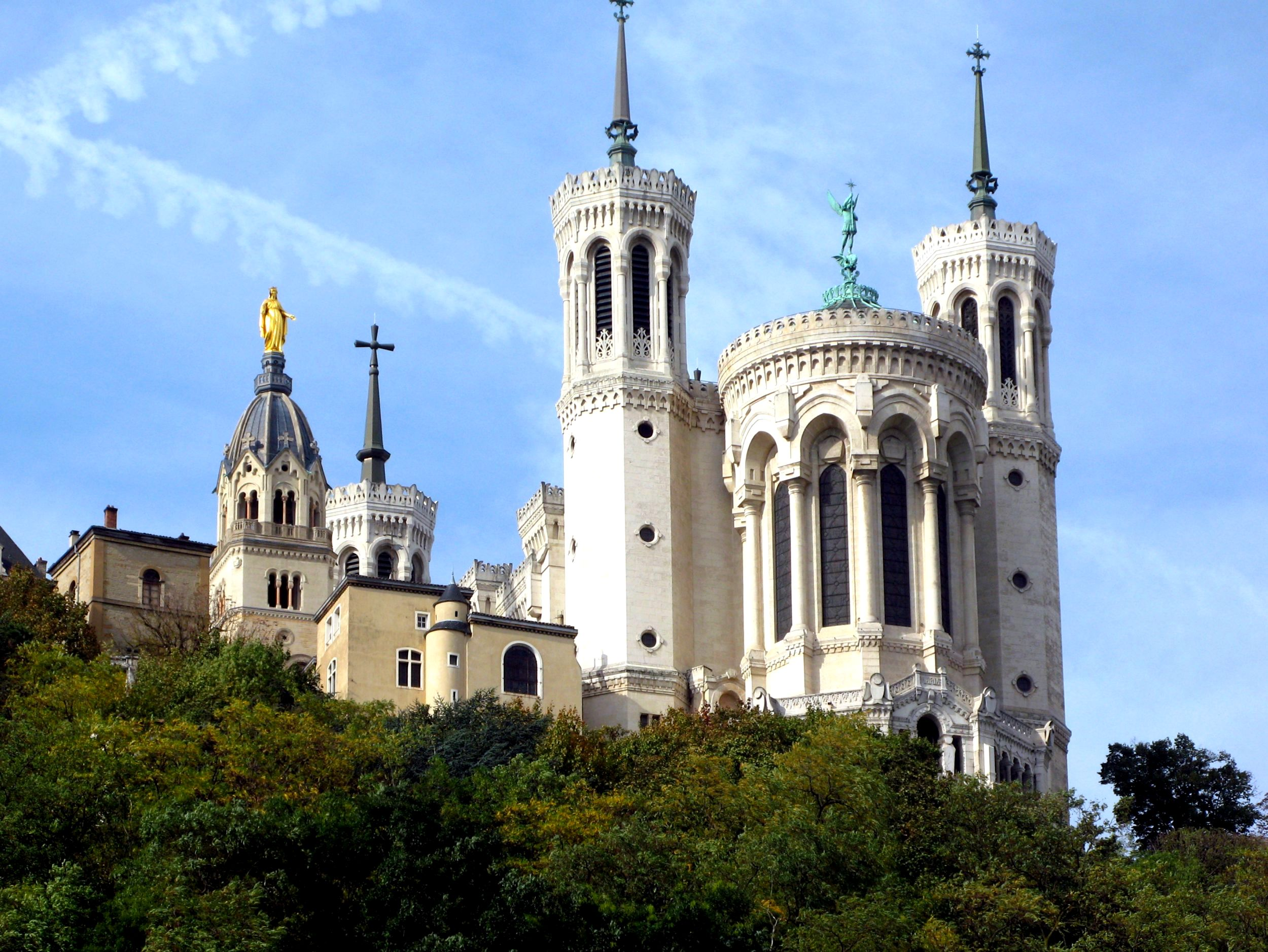 Basilica of Notre-Dame de Fourvière